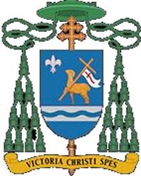 Escudo del I Arzobispo de León, méxico